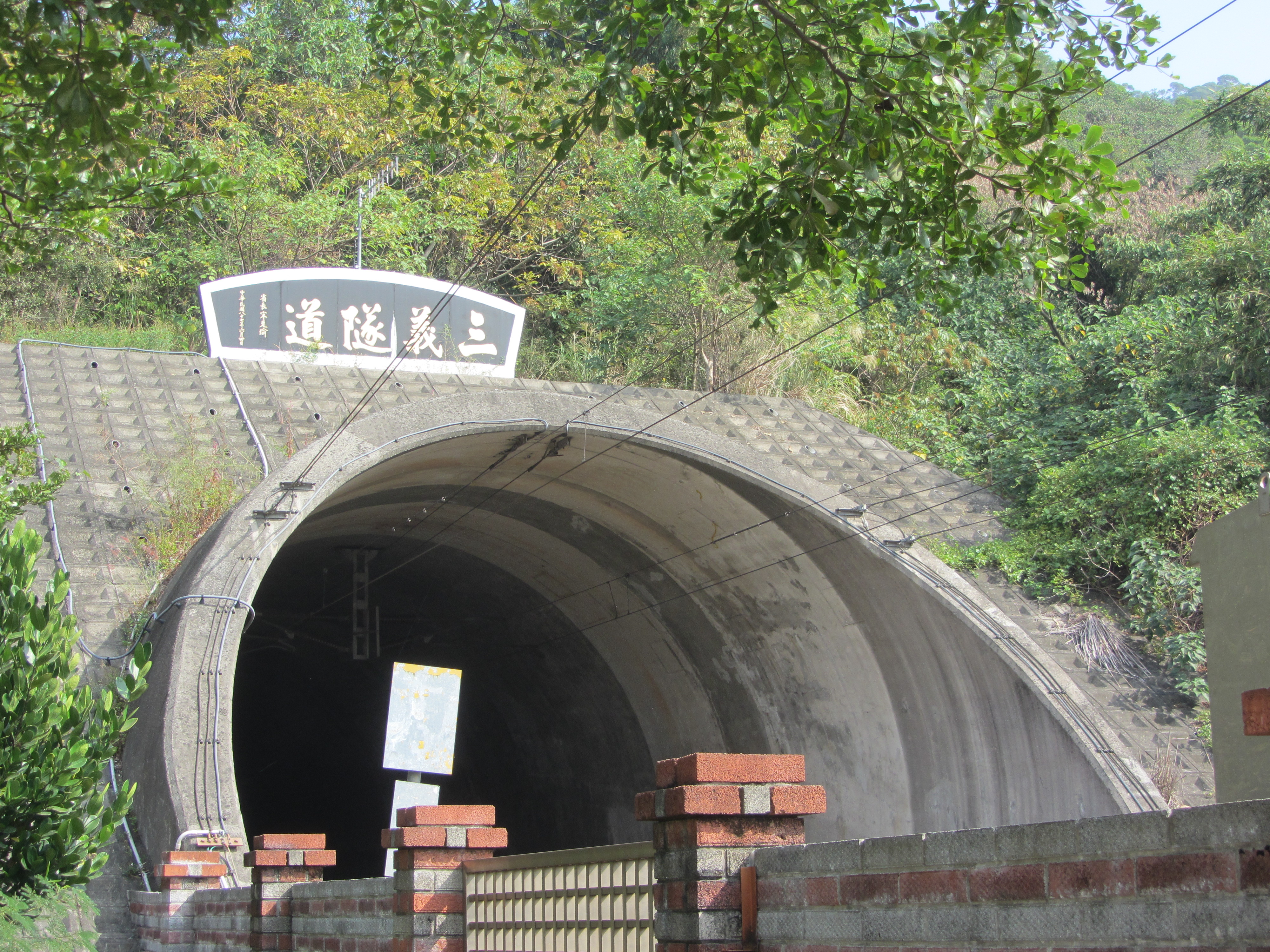 臺灣鐵路管理局山線三義隧道南口